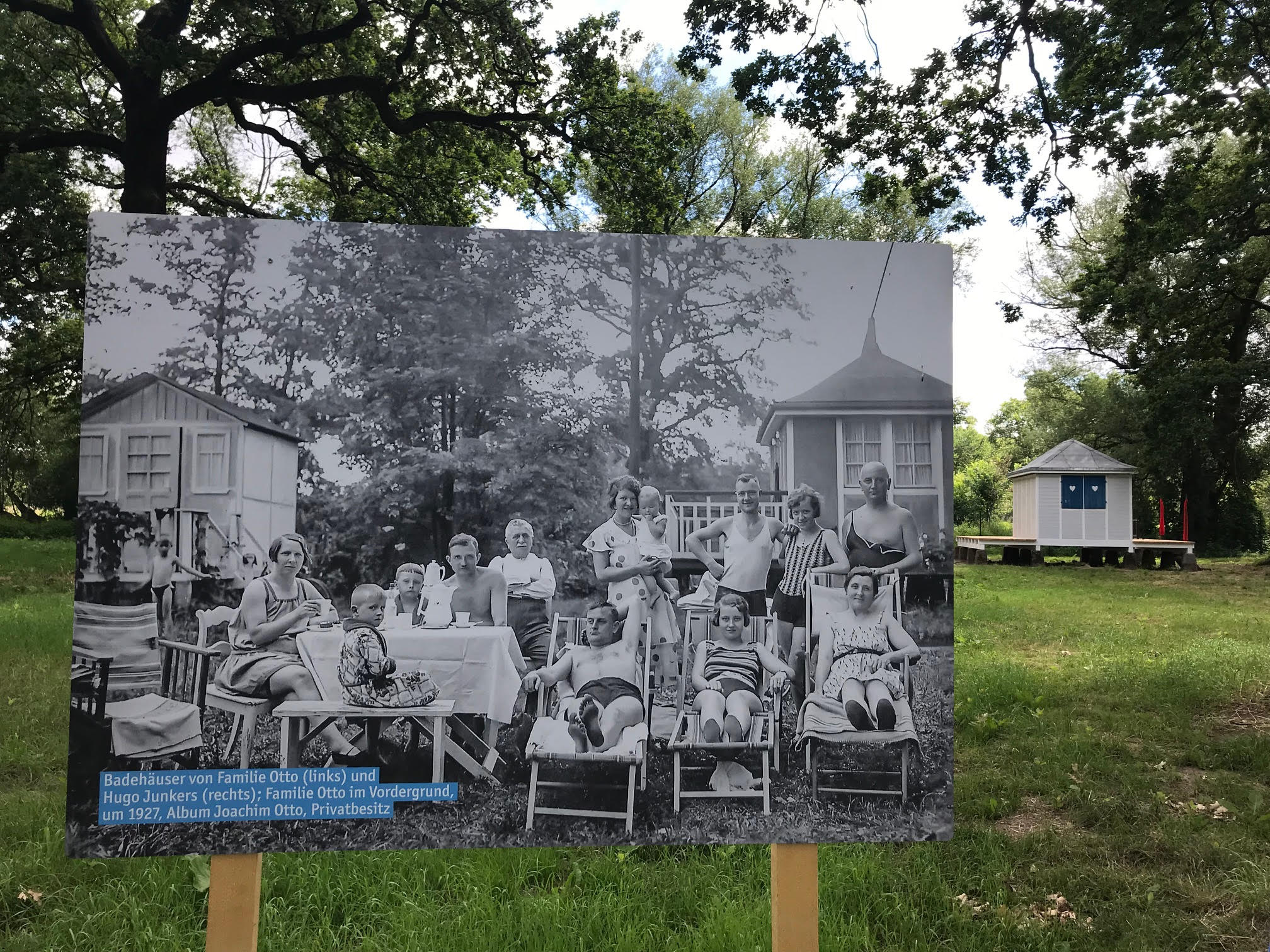 Reproduktion eines historischen Fotos mit Hugo Junkers im Flussbad Rehsumpf, Dessau. Seine Badehäuschen, inzwischen saniert, im Hintergrund rechts.